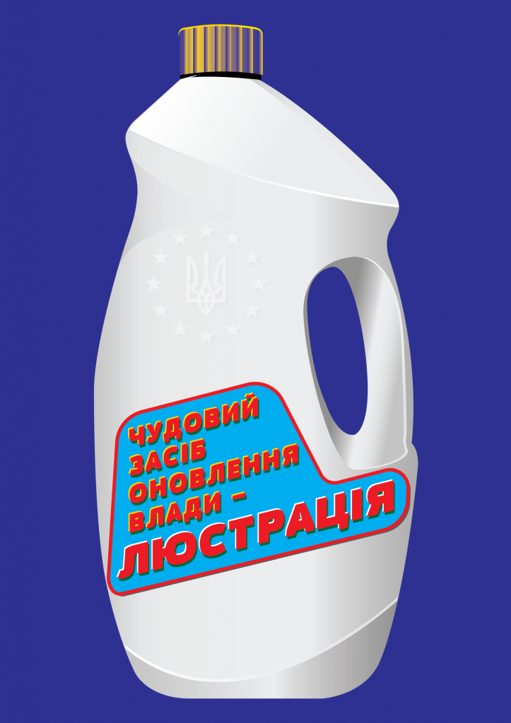 Революційні плакати від strongowski